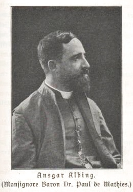 Paul de Mathies (auch Ansgar Albing) (1868-1924), deutscher katholischer Priester und Schriftsteller